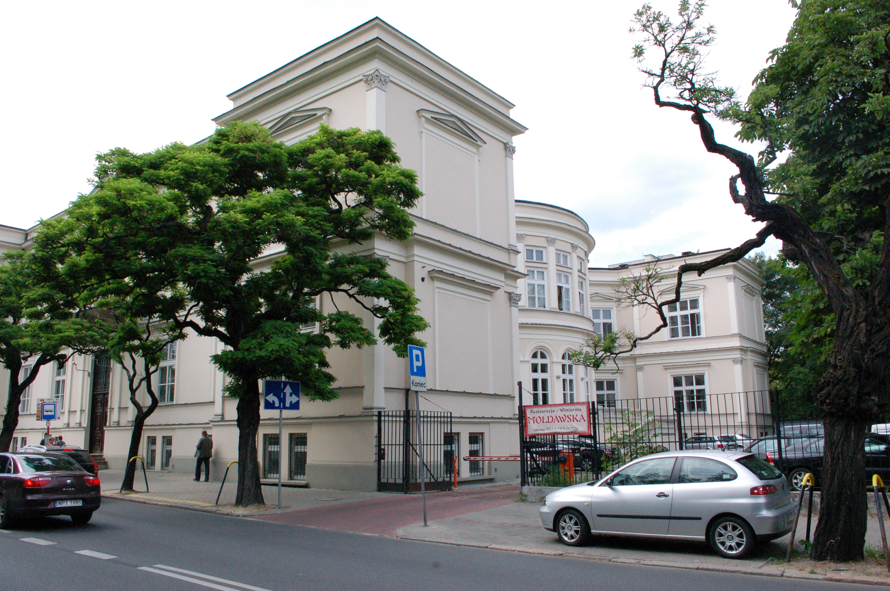 Warschau, Lesser-Palast, Rückseite mit Halbrund-Risalit